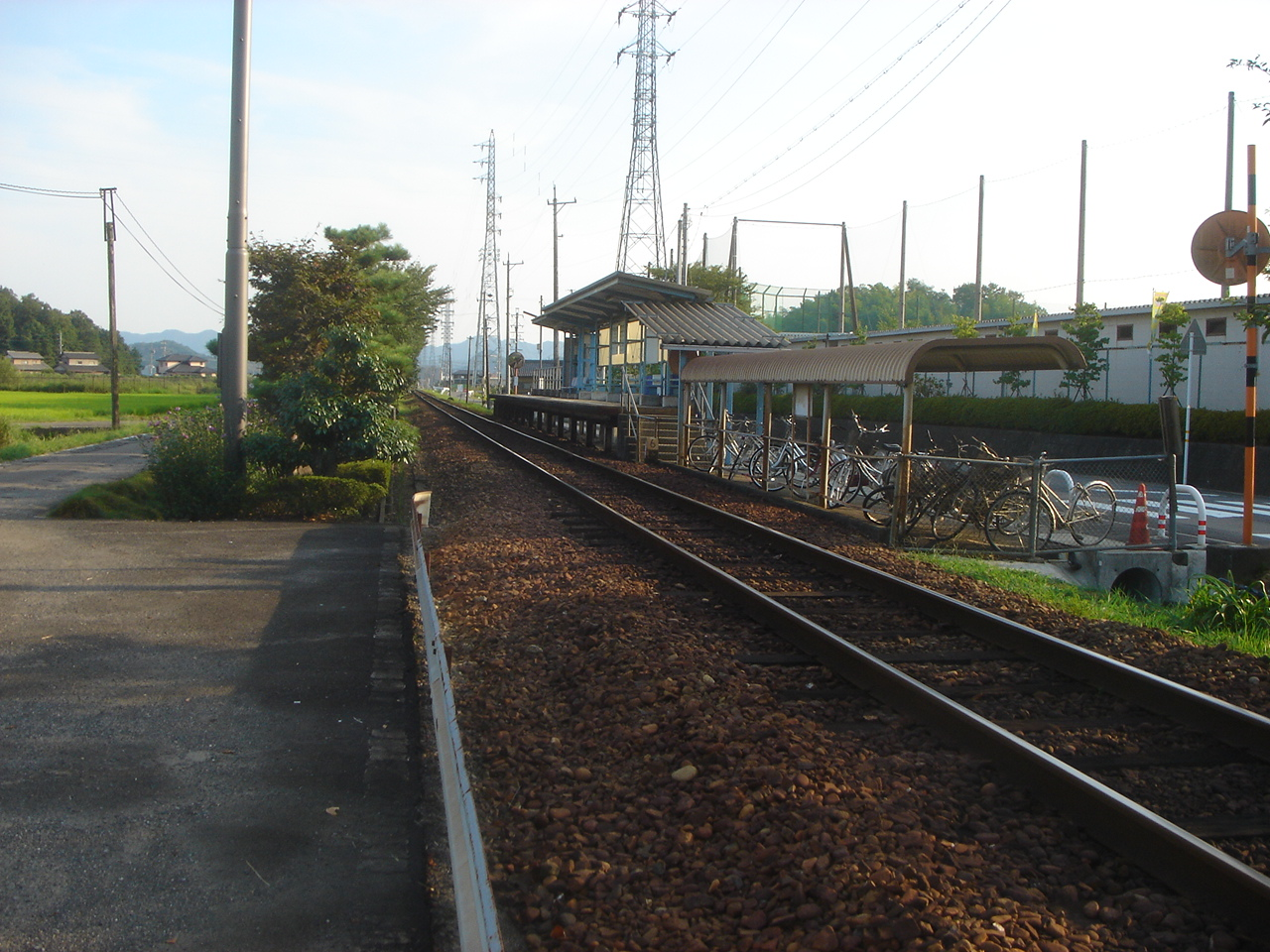 Seki-Shimouchi Station（関下有知駅）,Seki,Gifu,Japan(岐阜県関市)で北東より撮影。右側はw:ja:岐阜県立関有知高等学校。